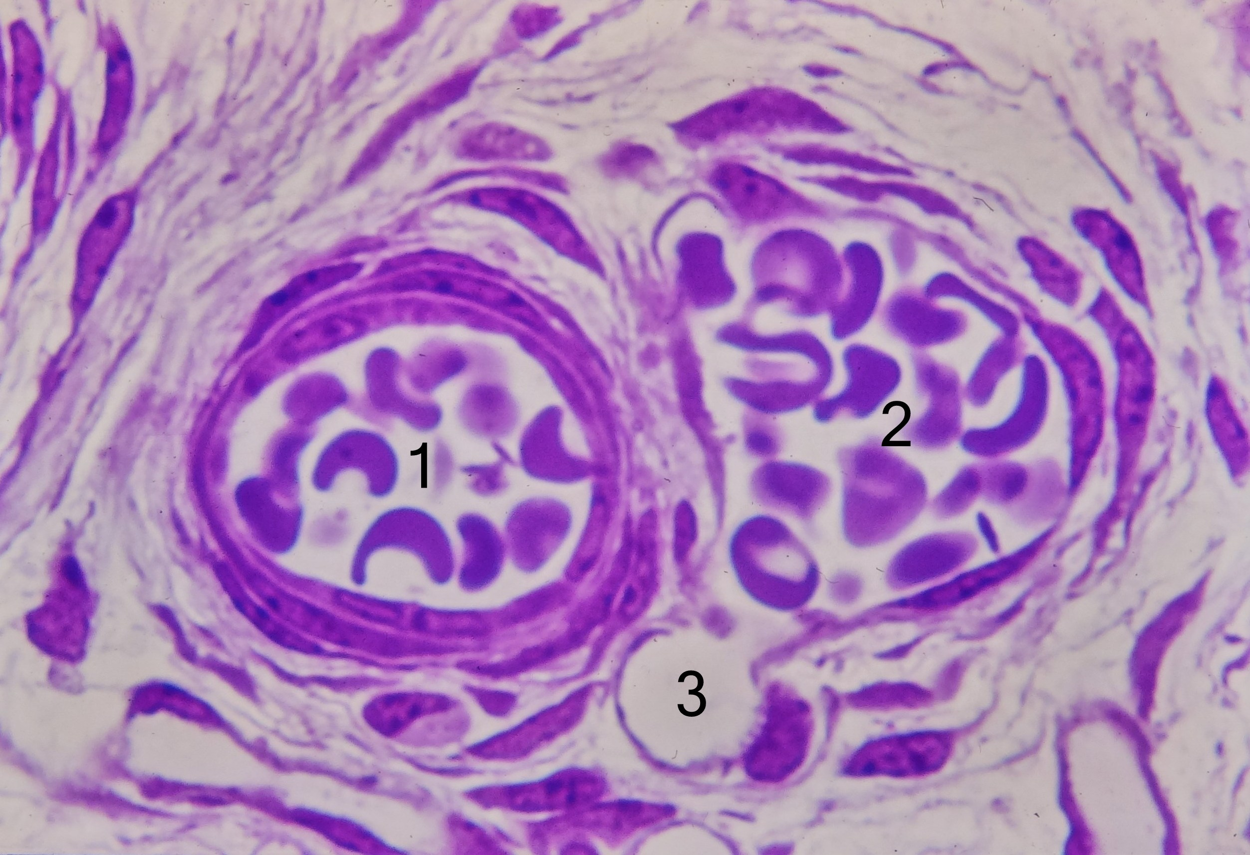 Lichtmikroskopisches Schnittbild kleiner Blutgefäße. 1 Arteriole, 2 Venole mit einmündender Kapillare 3. Kunststoff- Einbettung, Kresylviolett-Färbung